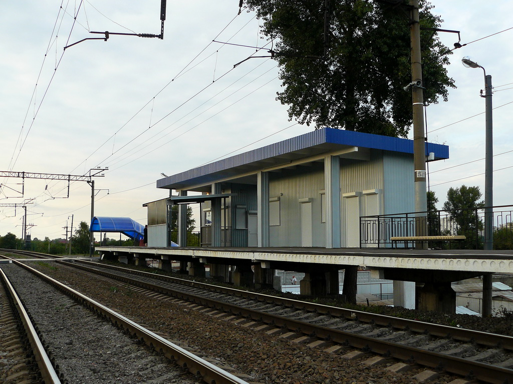 Платформа Троещина в Киеве, одна из остановок городской электрички